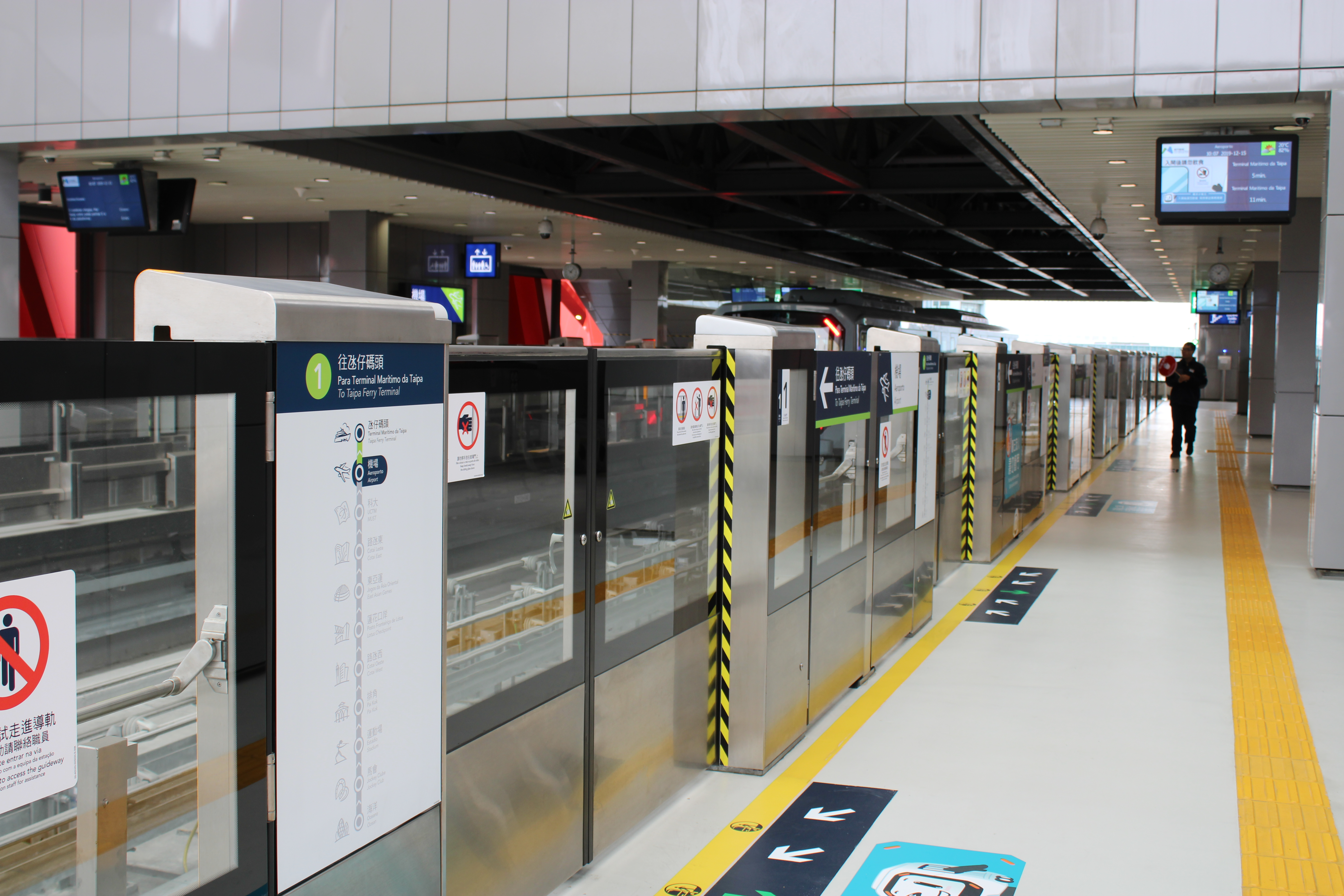 2019年12月的澳門輕軌氹仔線機場站月臺。